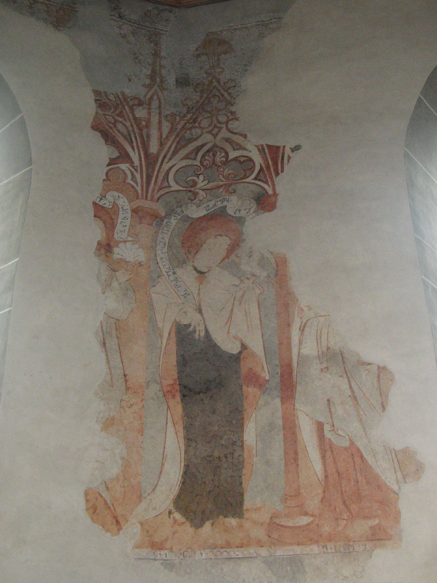 In der Stadtkirche Bremgarten